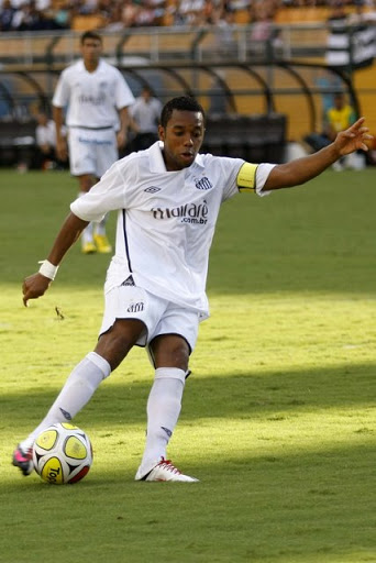 Robinho no Santos Futebol Clube em 2010.